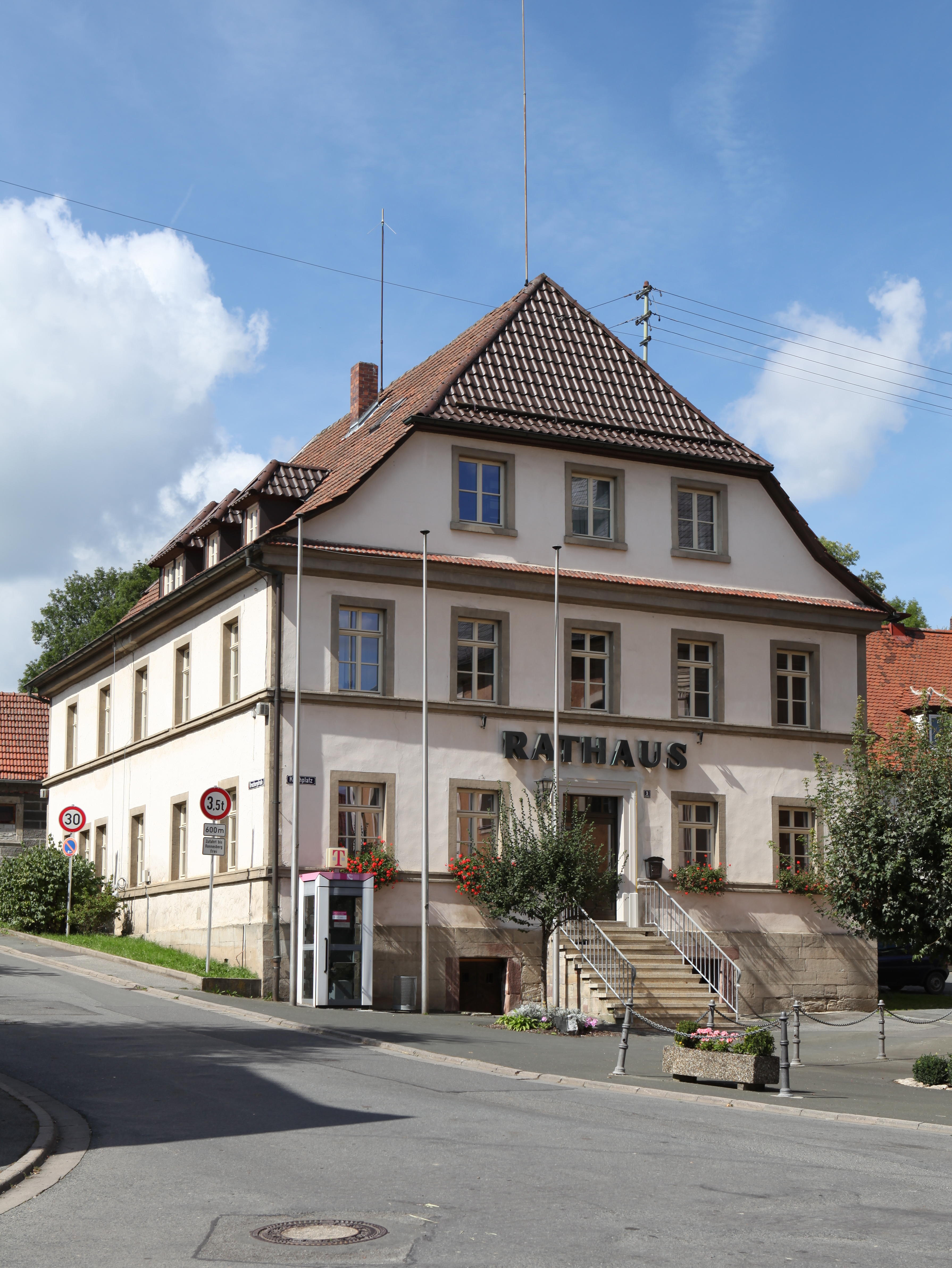 Rathaus in Marktrodach, OT Unterrodach, Landkreis Kronach